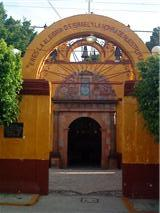 es la capilla del alma de la virgen ubicada en el centro del municipio